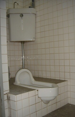 TOTO C75A-003